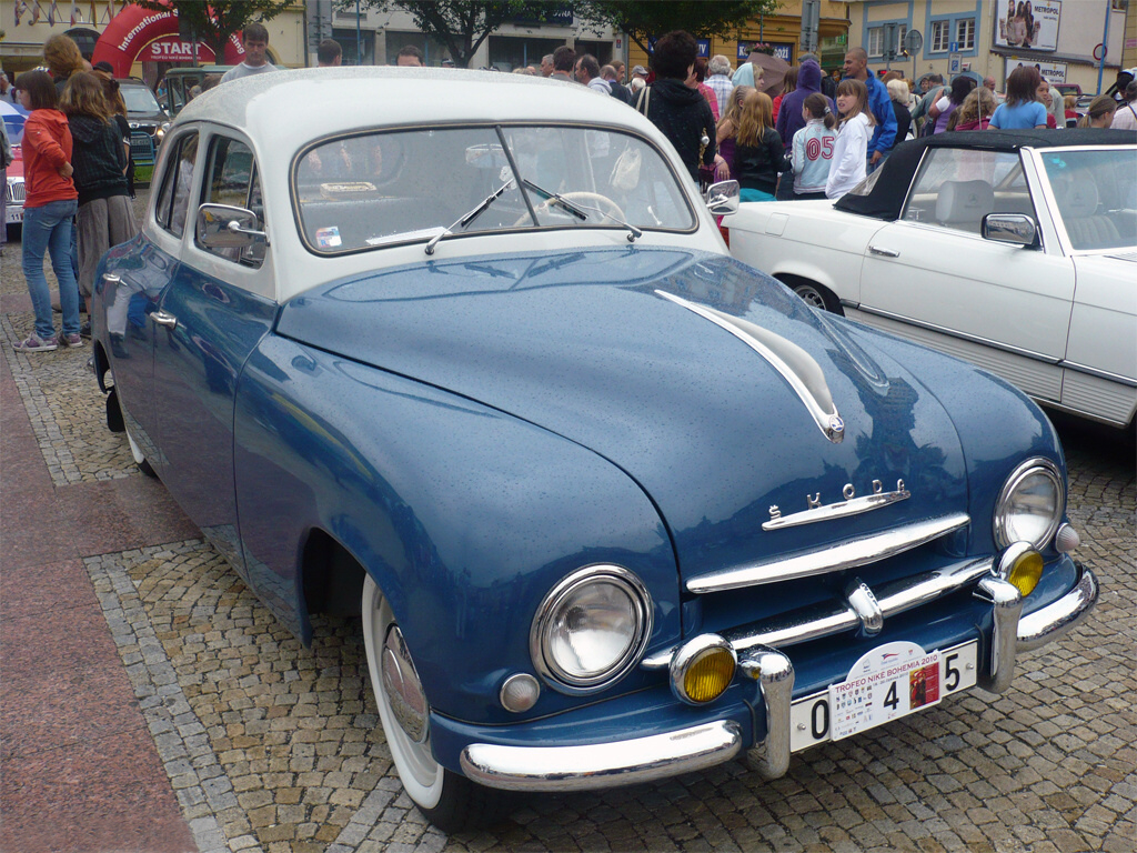 Škoda 1201 - Trofeo Niké Bohemia 2010 - Děčín